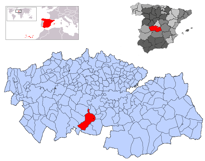 Menasalbas en la provincia de Toledo